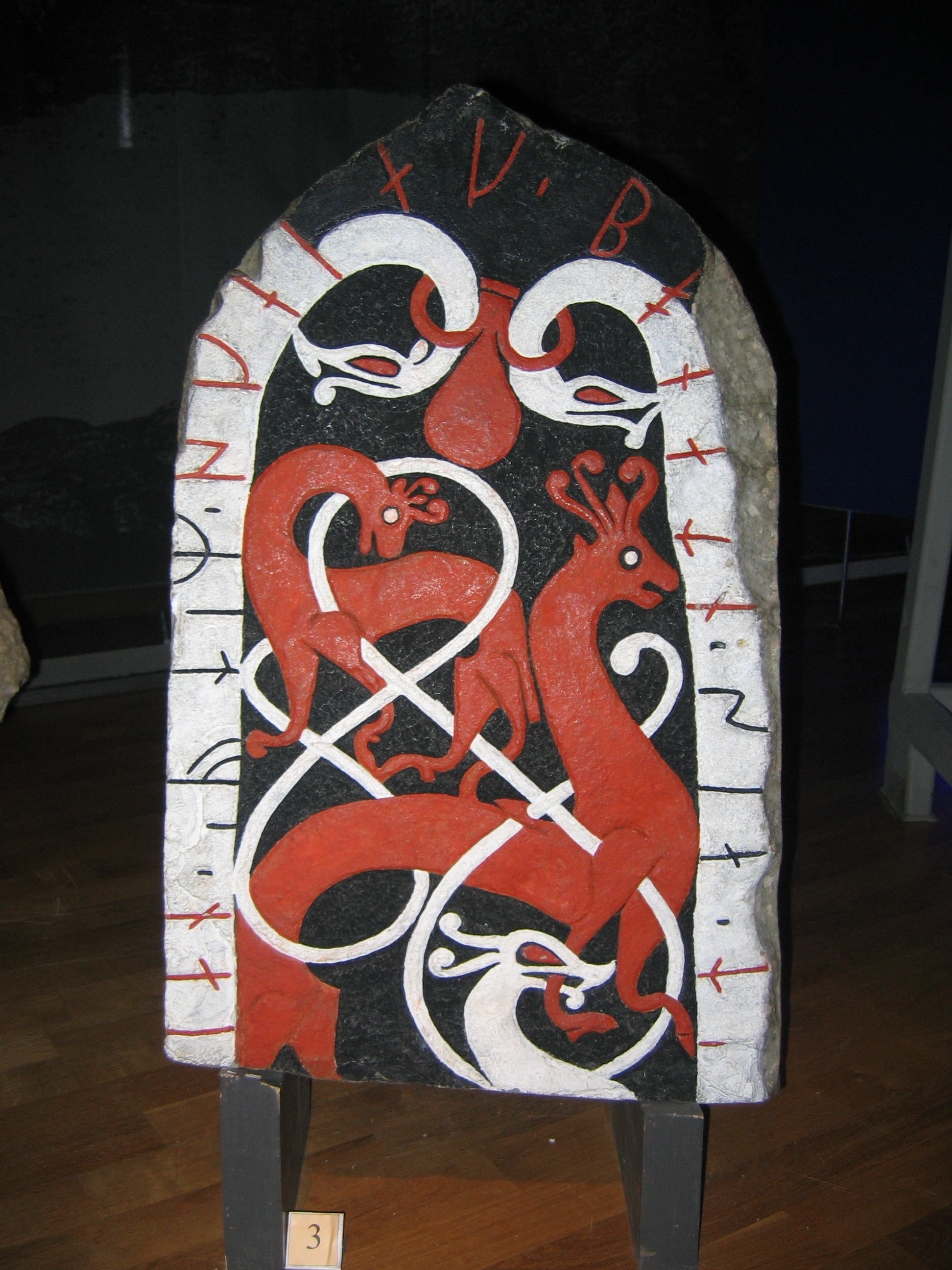 Runstenen Öl Fv1911;274B på Statens historiska museum. Stenen hittades i Resmo kyrka på Öland.